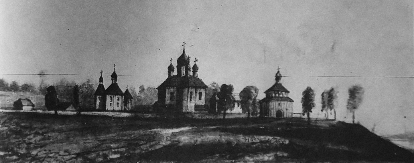 Беларуская (тарашкевіца): Ворша. Богаяўленскі манастыр у прадмесьці Куцейна.